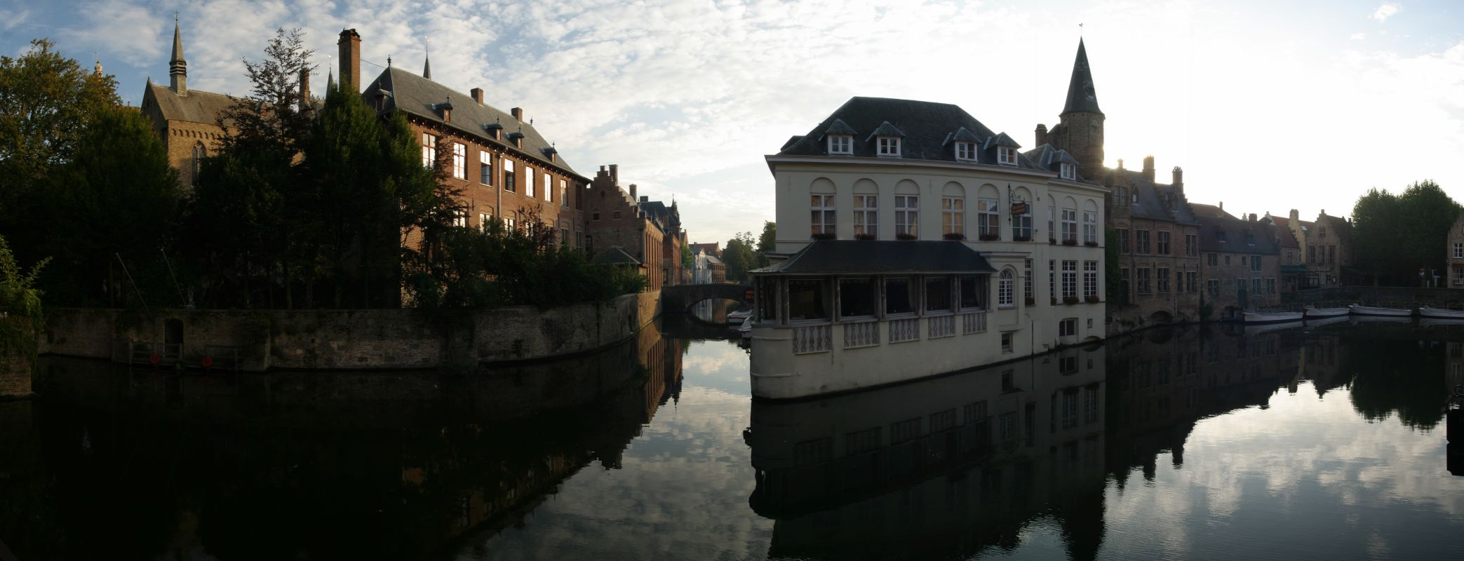 Bruges